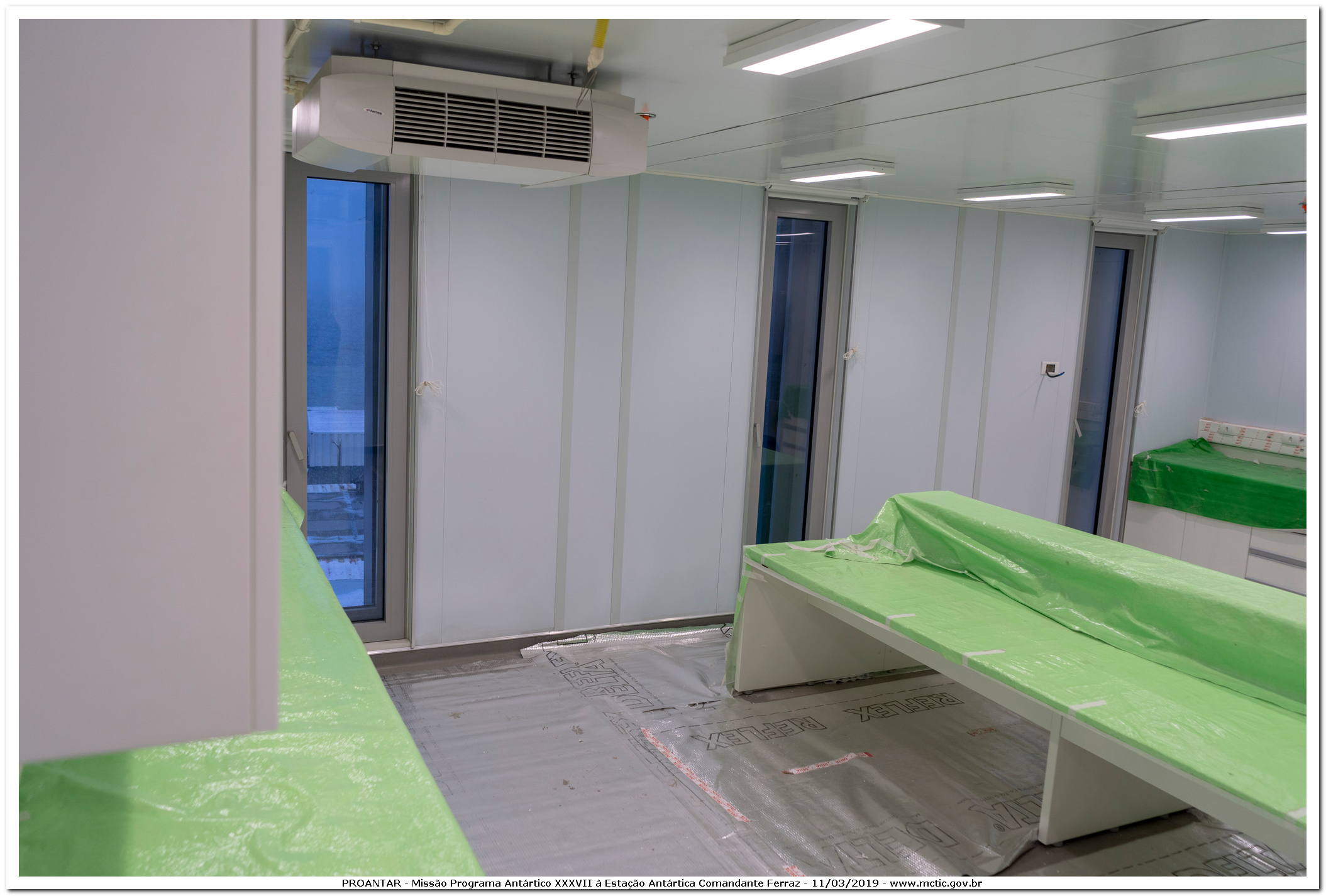 PROANTAR - Missão Programa Antártico XXXVII à estação Antartica Comandante Ferraz 11/03/2019 - Uma parceria entre Ministério da Ciência, Tecnologia, Inovações e Comunicações(MCTIC), Marinha do Brasil e Operadora Oi.